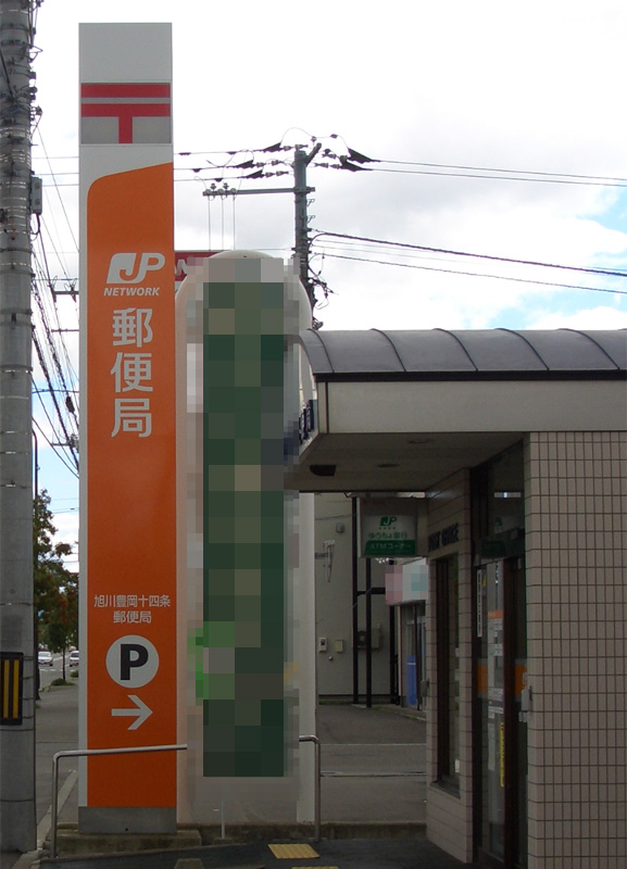 民営化を前日に控え、すでにカバーが外された郵便局の看板。